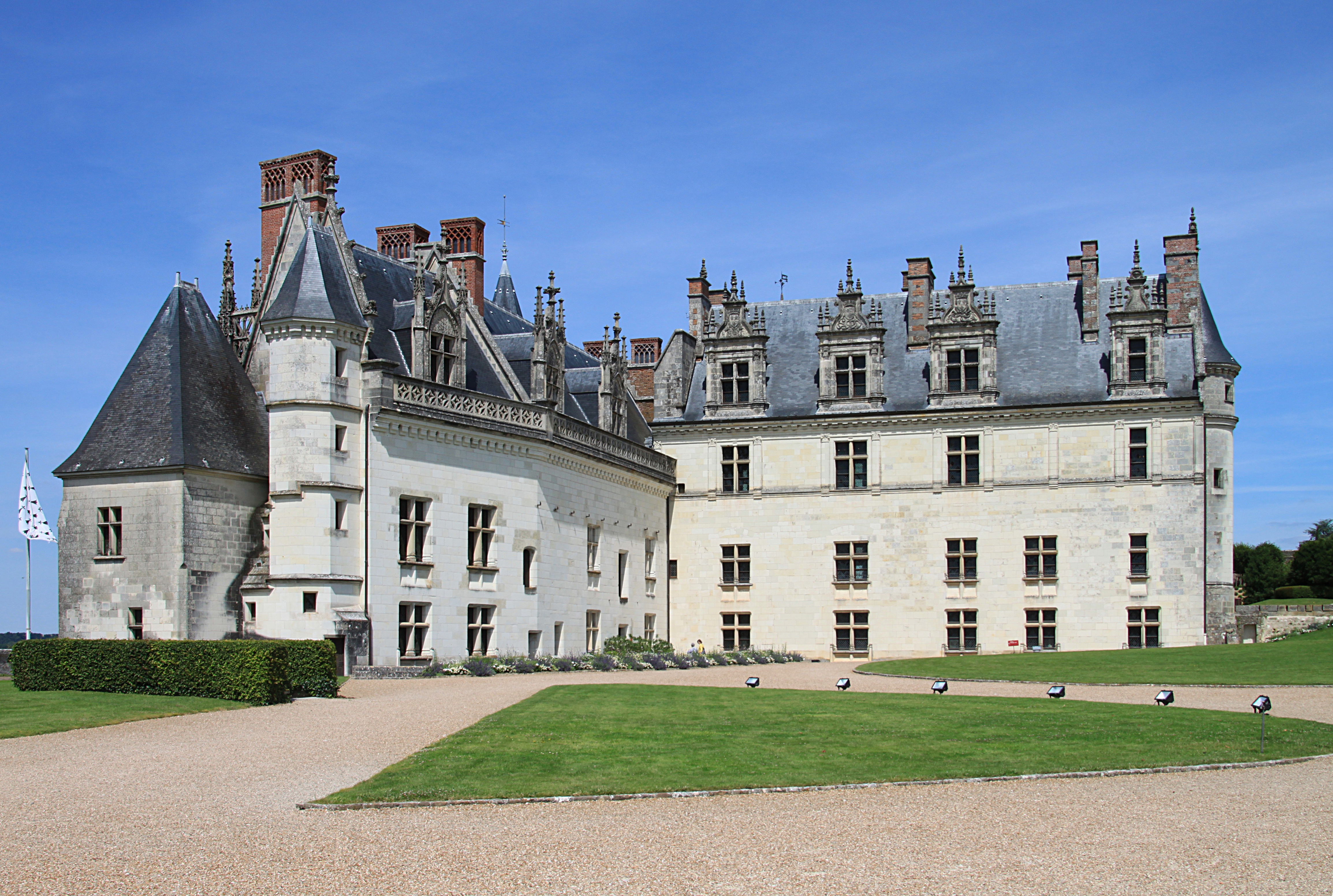 Schloss Amboise, Hoffassade des Logis Royal